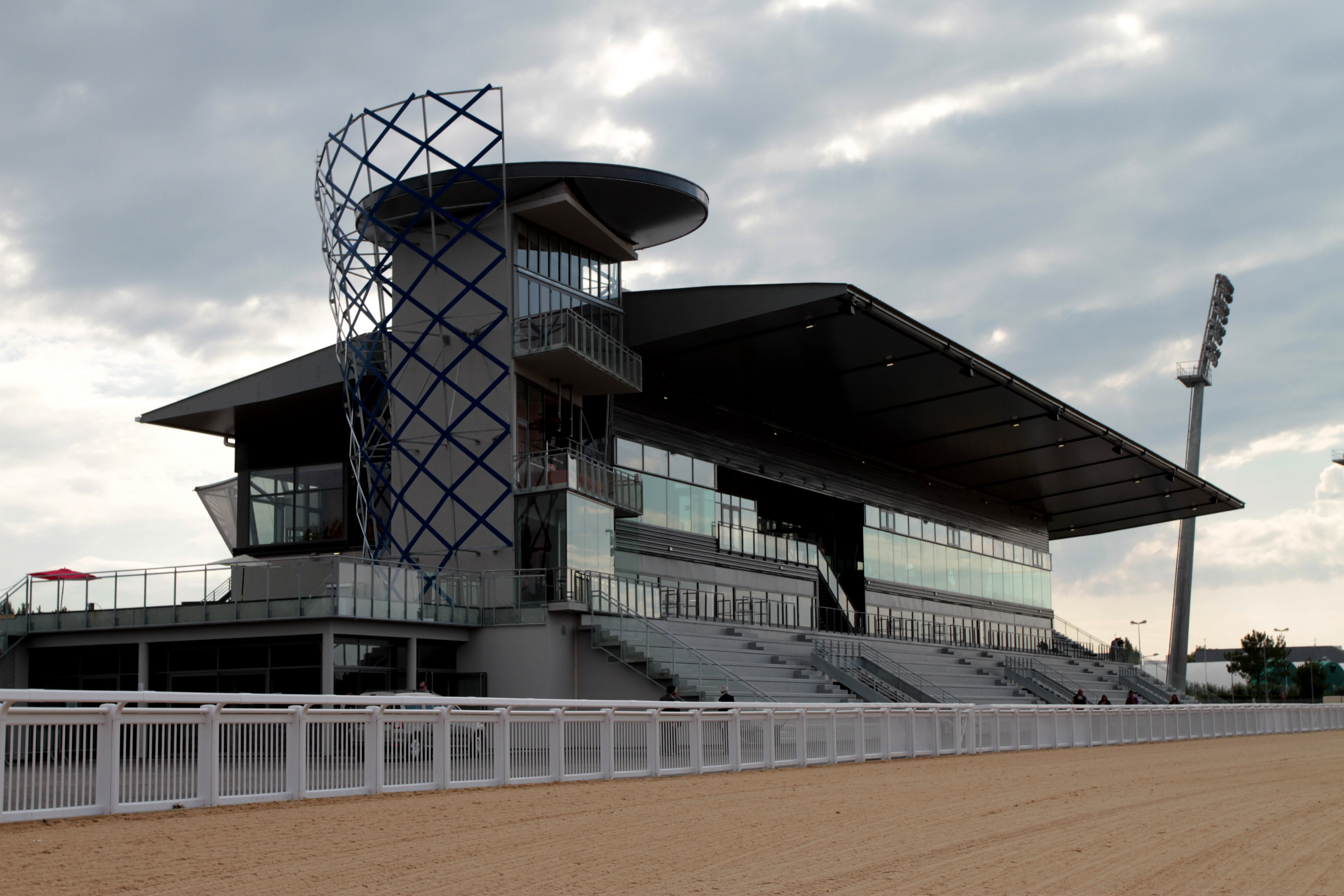 Le nouvel hippodrome de Pornichet